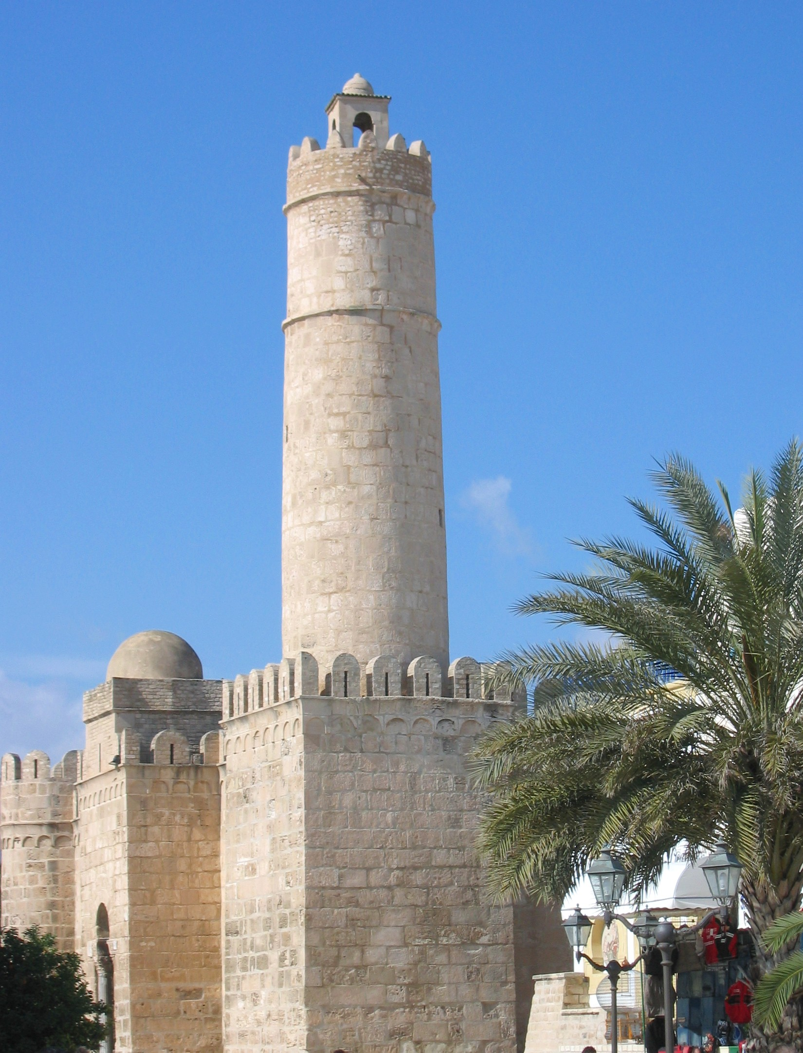 ribat in Sousse user Mathiasrex -Maciej Szczepańczyk